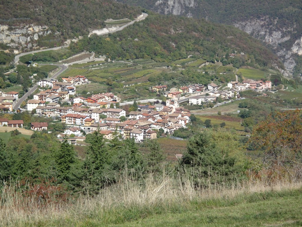 Panorama di Besagno